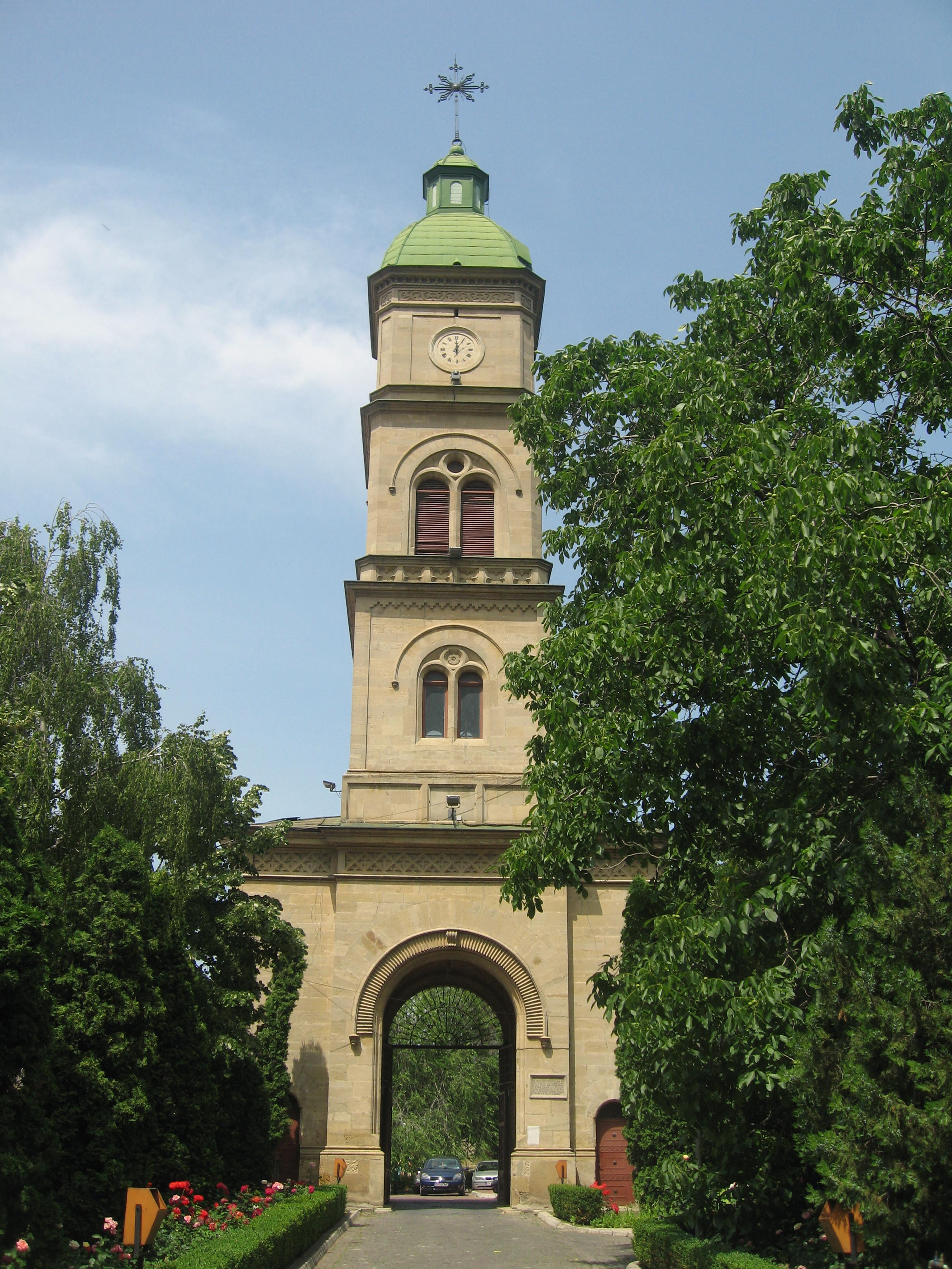 Biserica Bărboi din Iași